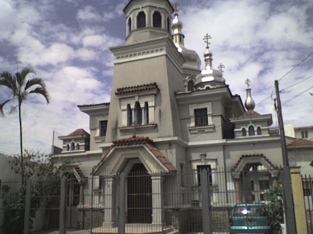 Igreja em São Caetano do Sul.